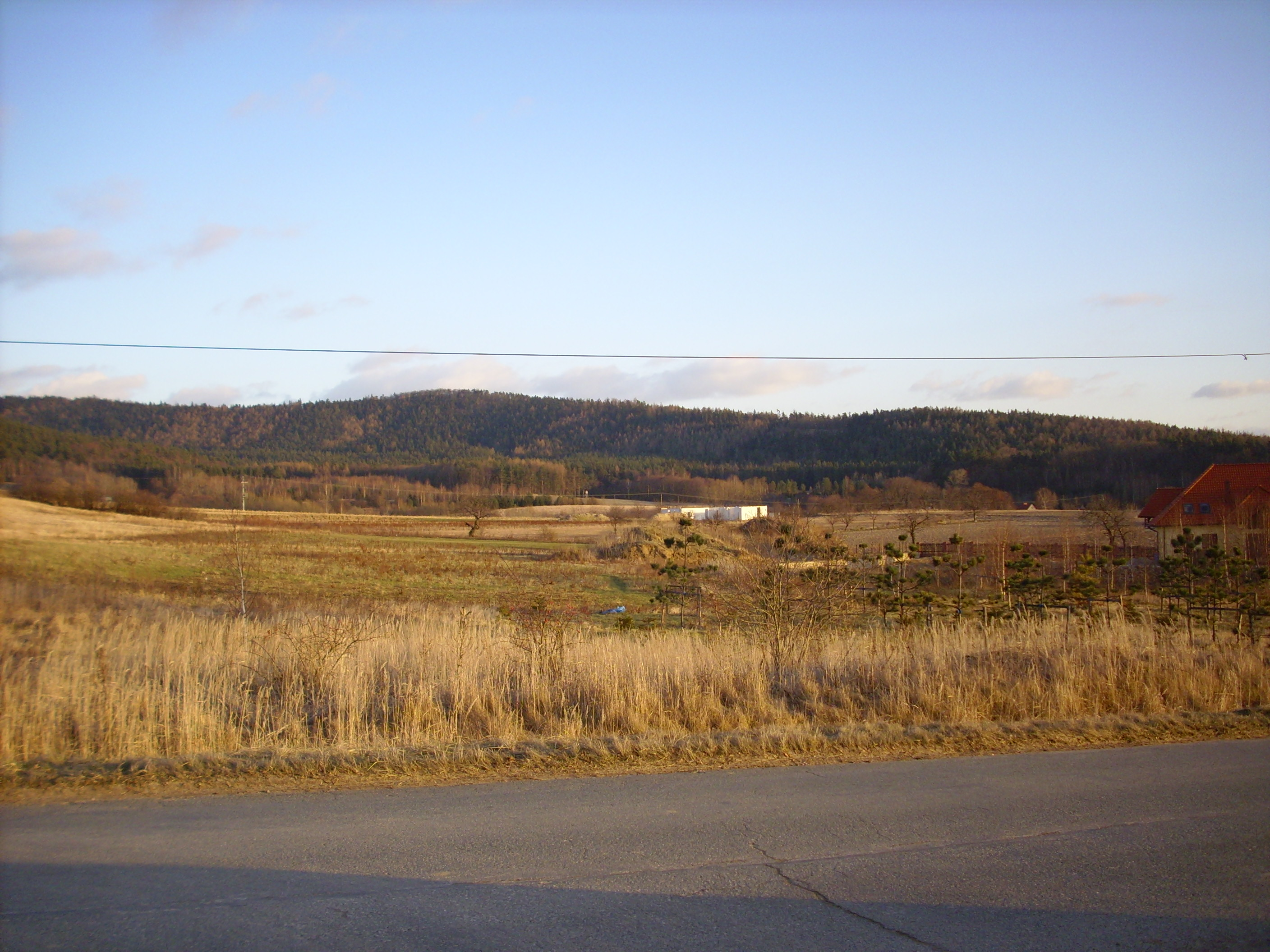 Wzgórza Kiełczyńskie w Masywie Ślęży na Przedgórzu Sudeckim.